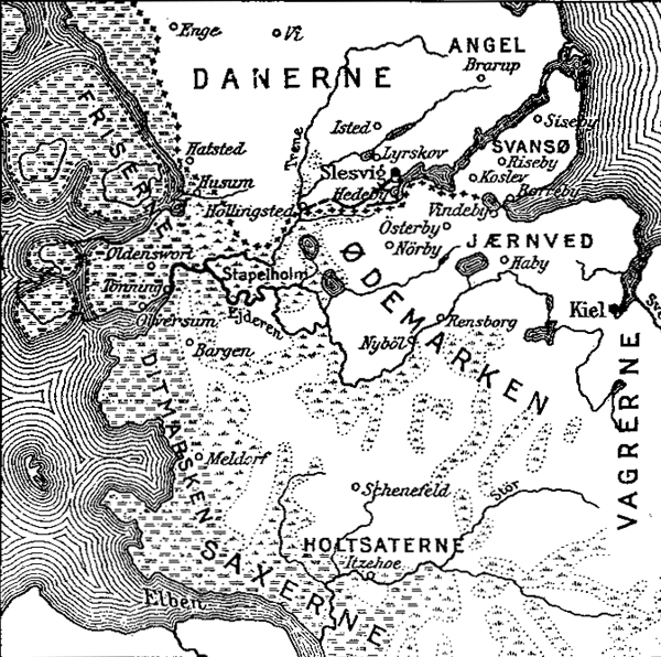 Historisk kort over området omkring Ejderen.